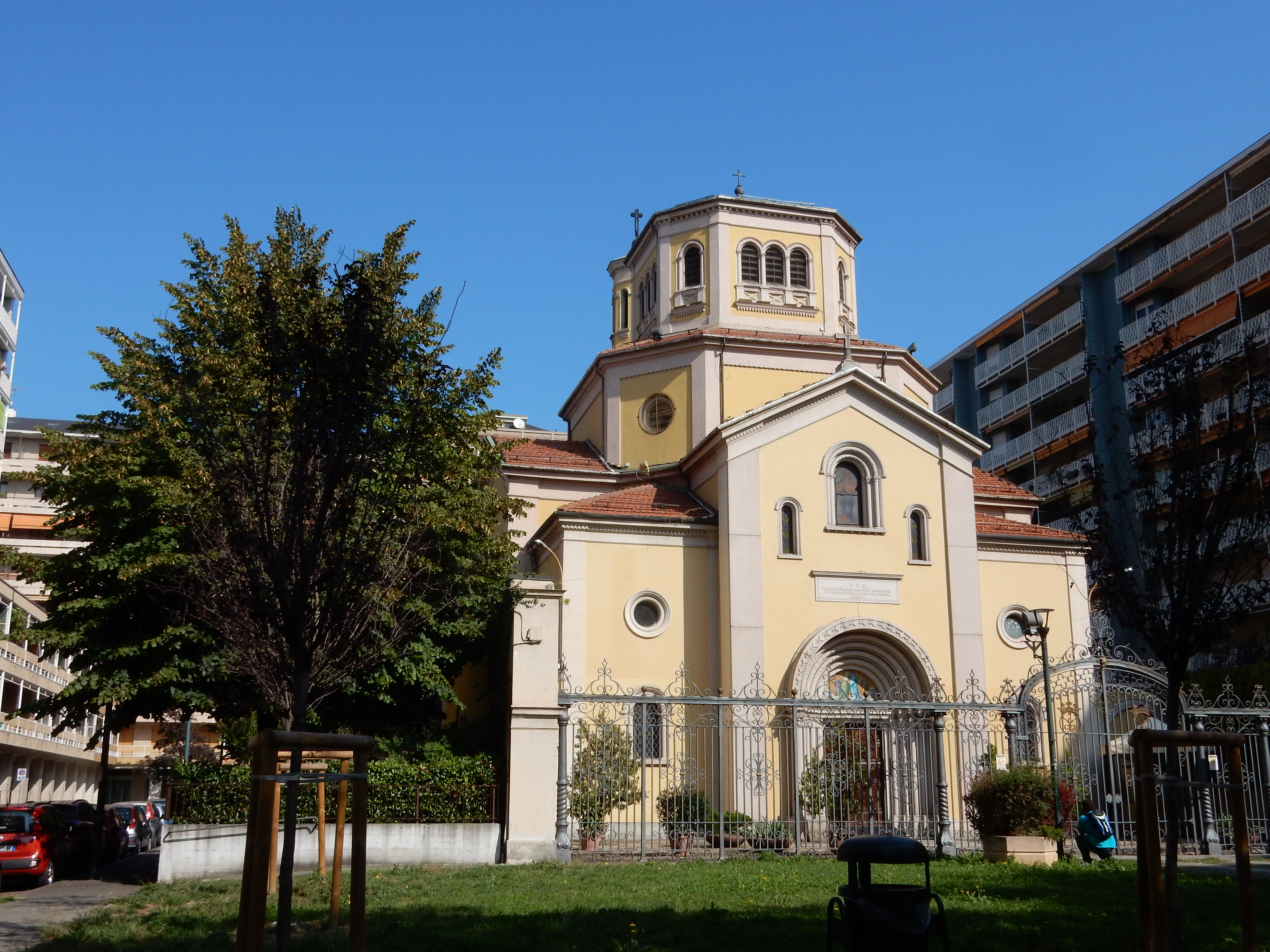 Chiesa della Vistiazione